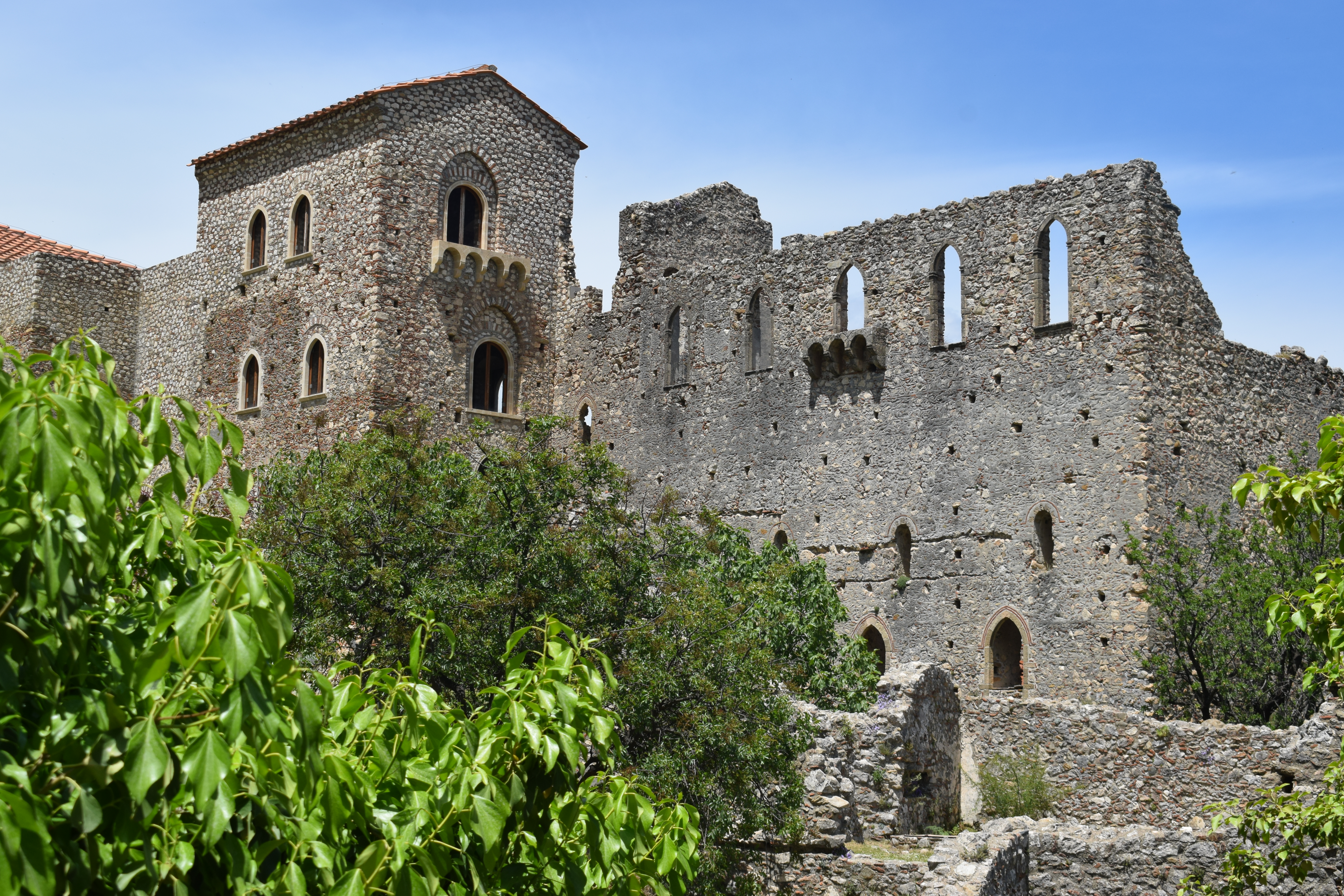 Vue de Mystras en Laconie, dans le sud du Péloponnèse en Grèce.